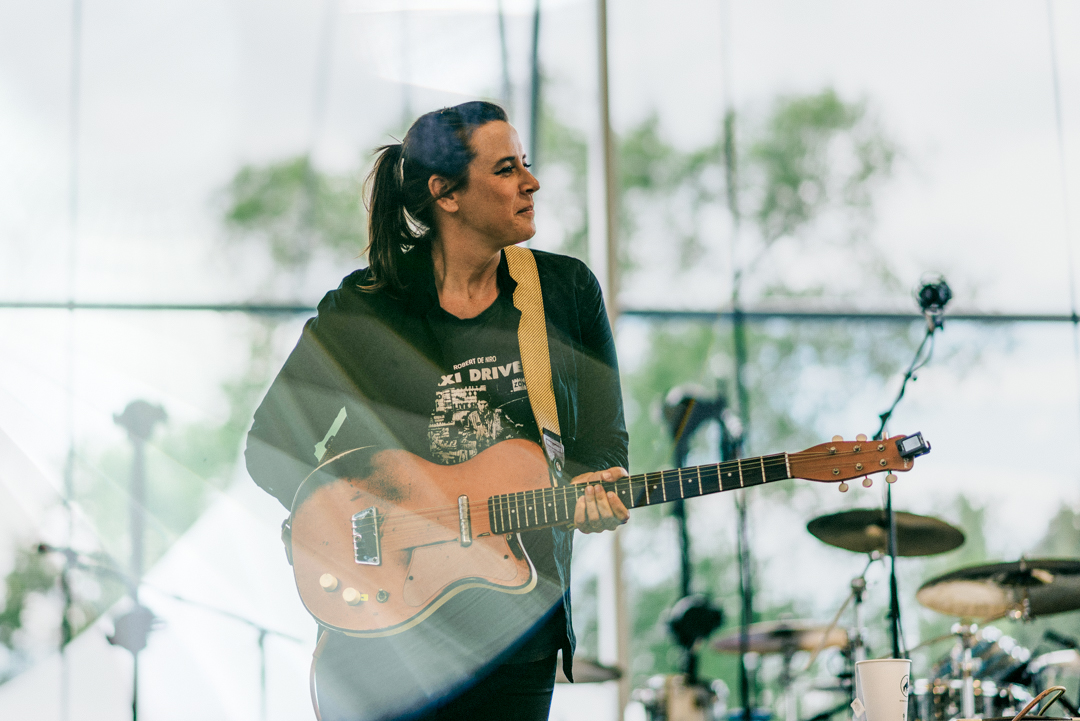 Interstellar Rodeo 2016 Edmonton, Canada